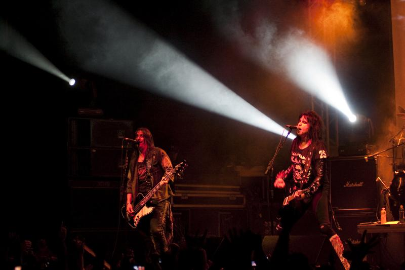 W.A.S.P. Live @ Santana Hall - 10/04/2010 - São Paulo, Brasil É proibida a cópia ou reprodução deste material sem a autorização do autor. Por favor, não publique nada daqui sem o devido crédito. Fotógrafo: Alexandre Cardoso